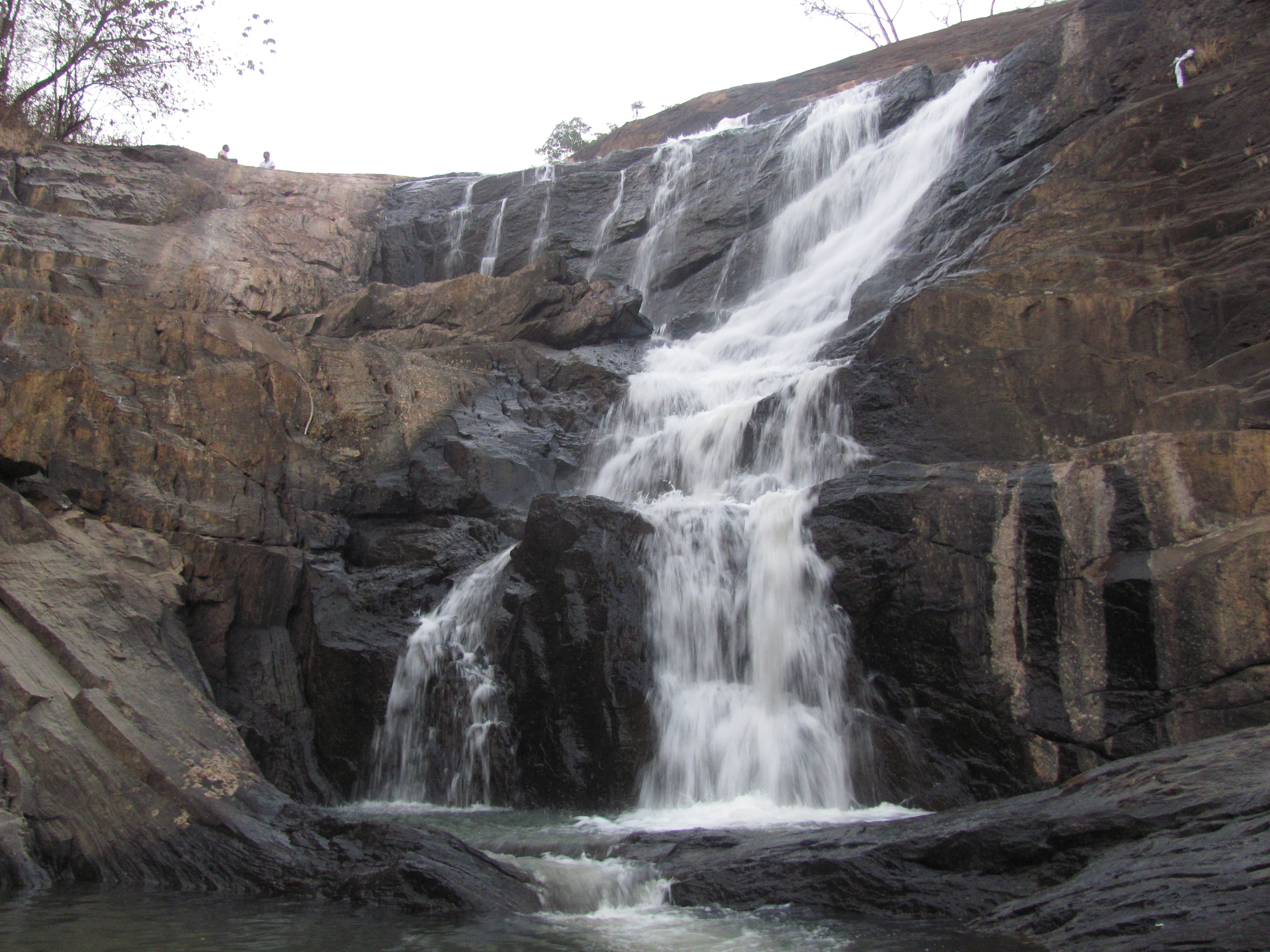 കാന്തൻപാറ വെള്ളച്ചാട്ടം